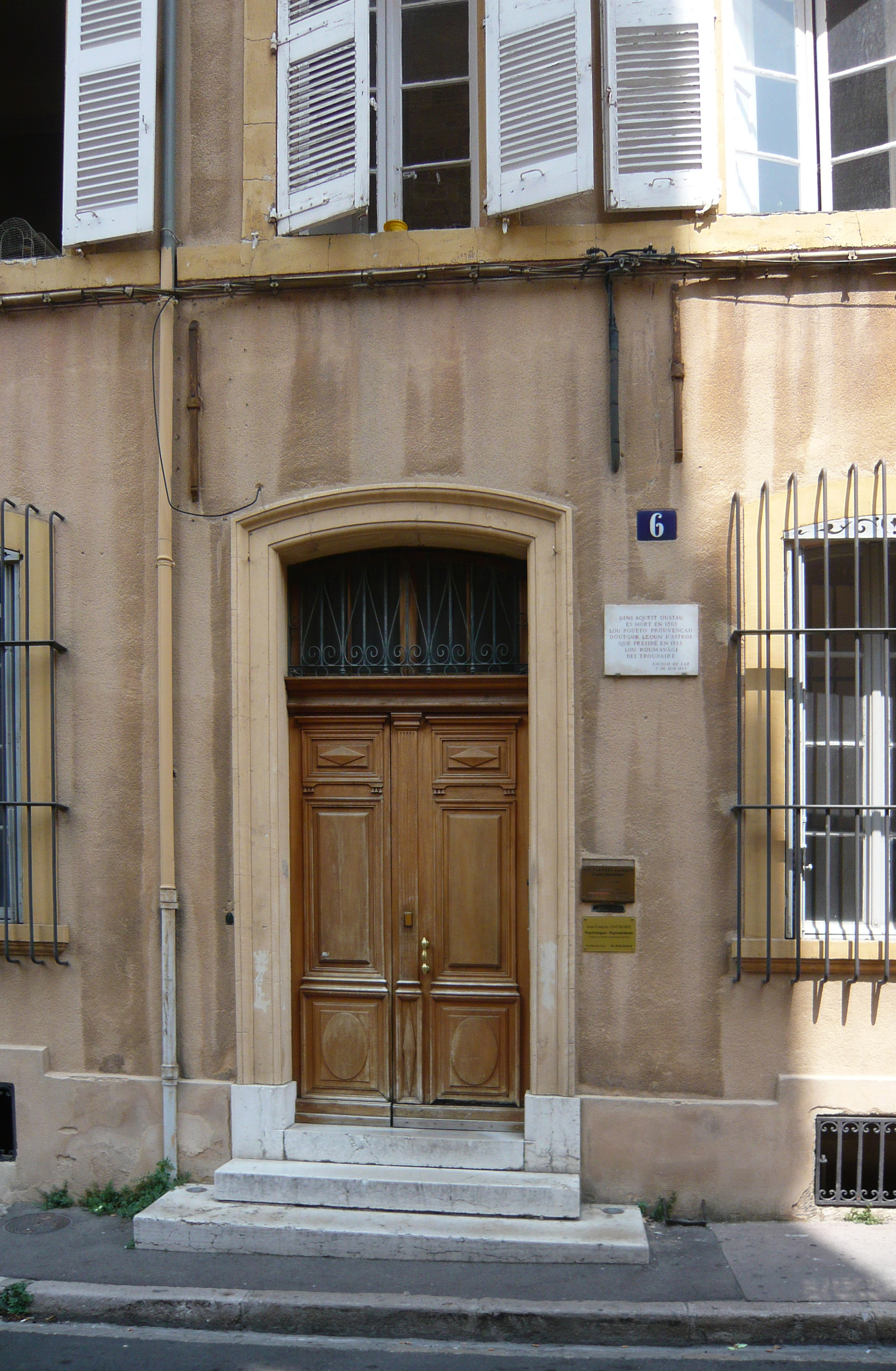 Plaque Léon d'Astros 6 rue Cardinale Aix-en-Provence